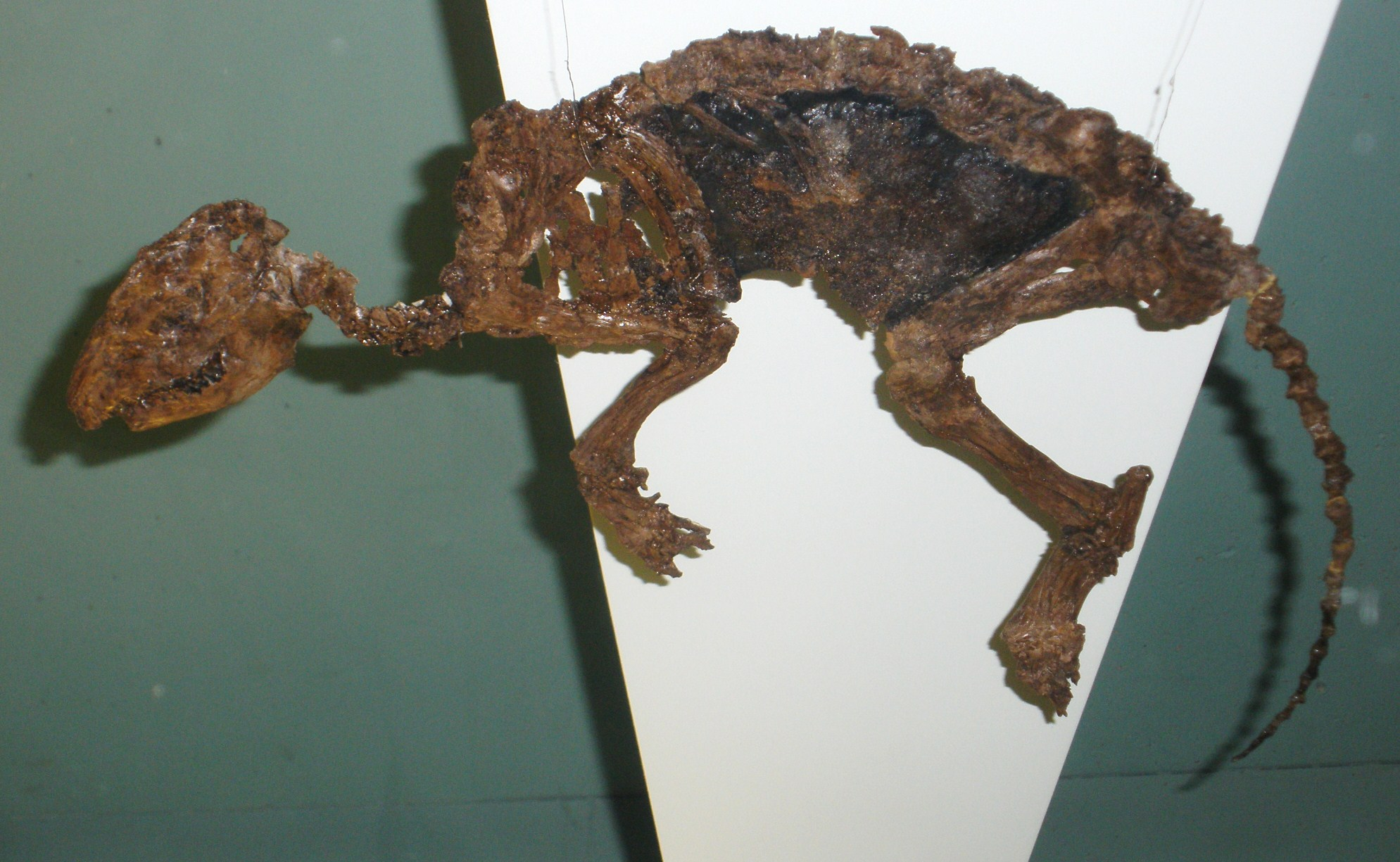 Fossil of Aumelasia, an extinct mammal- Took the photo at Senckenberg Museum of Frankfurt